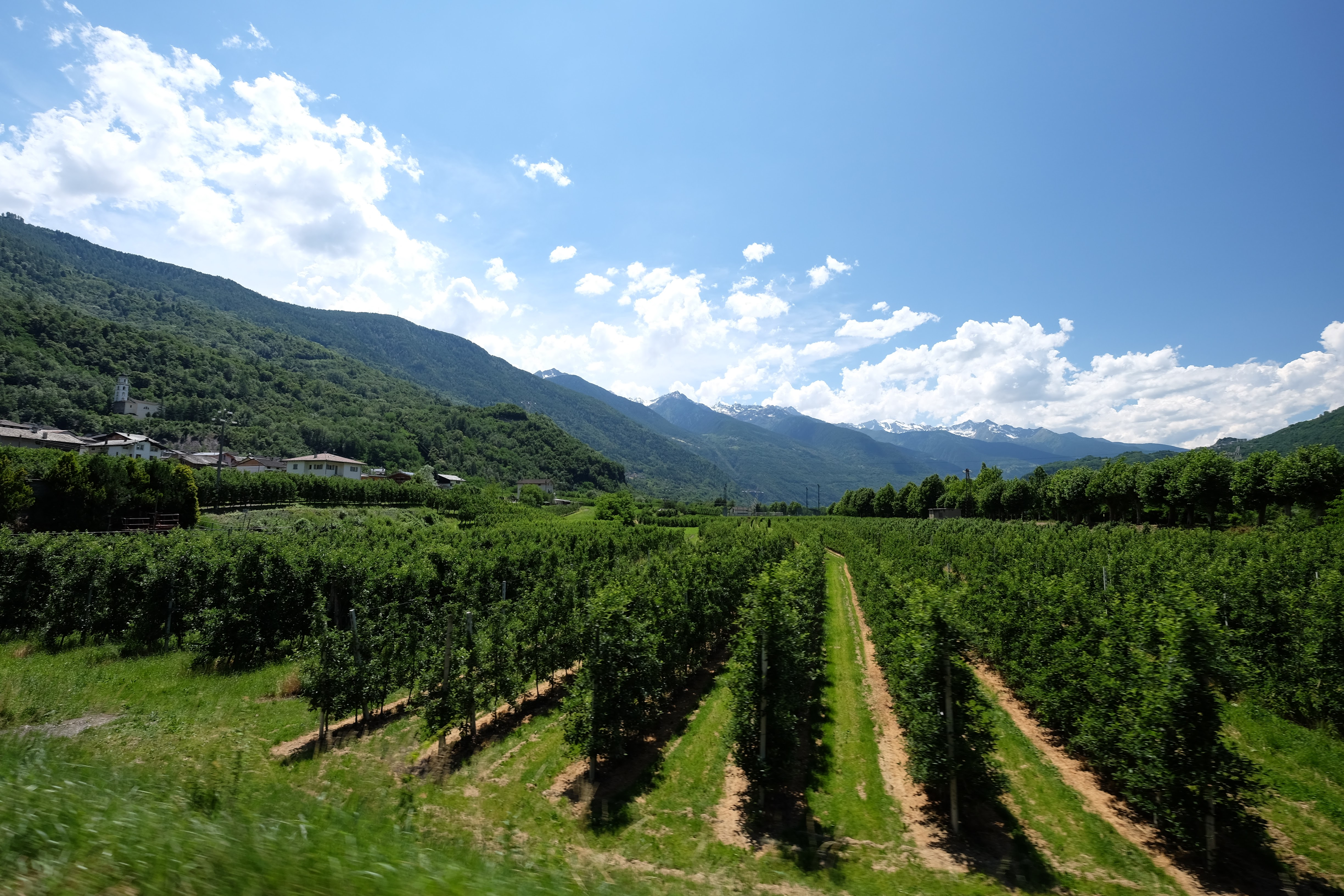 23030 Villa di Tirano SO, Italy